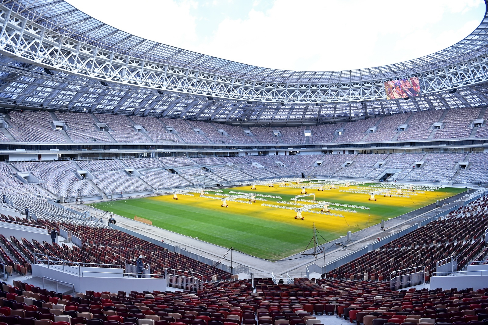 Реконструкция стадиона «Лужники» в Москве.